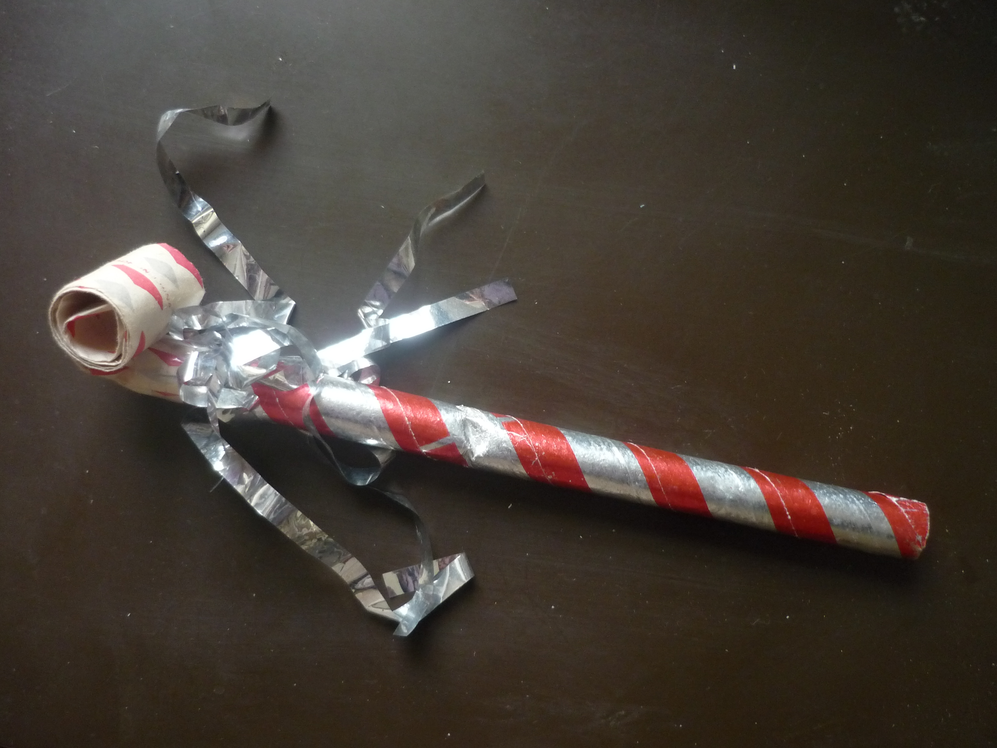 Un mirliton vendu à Paris et fabriqué dans les années 1990.